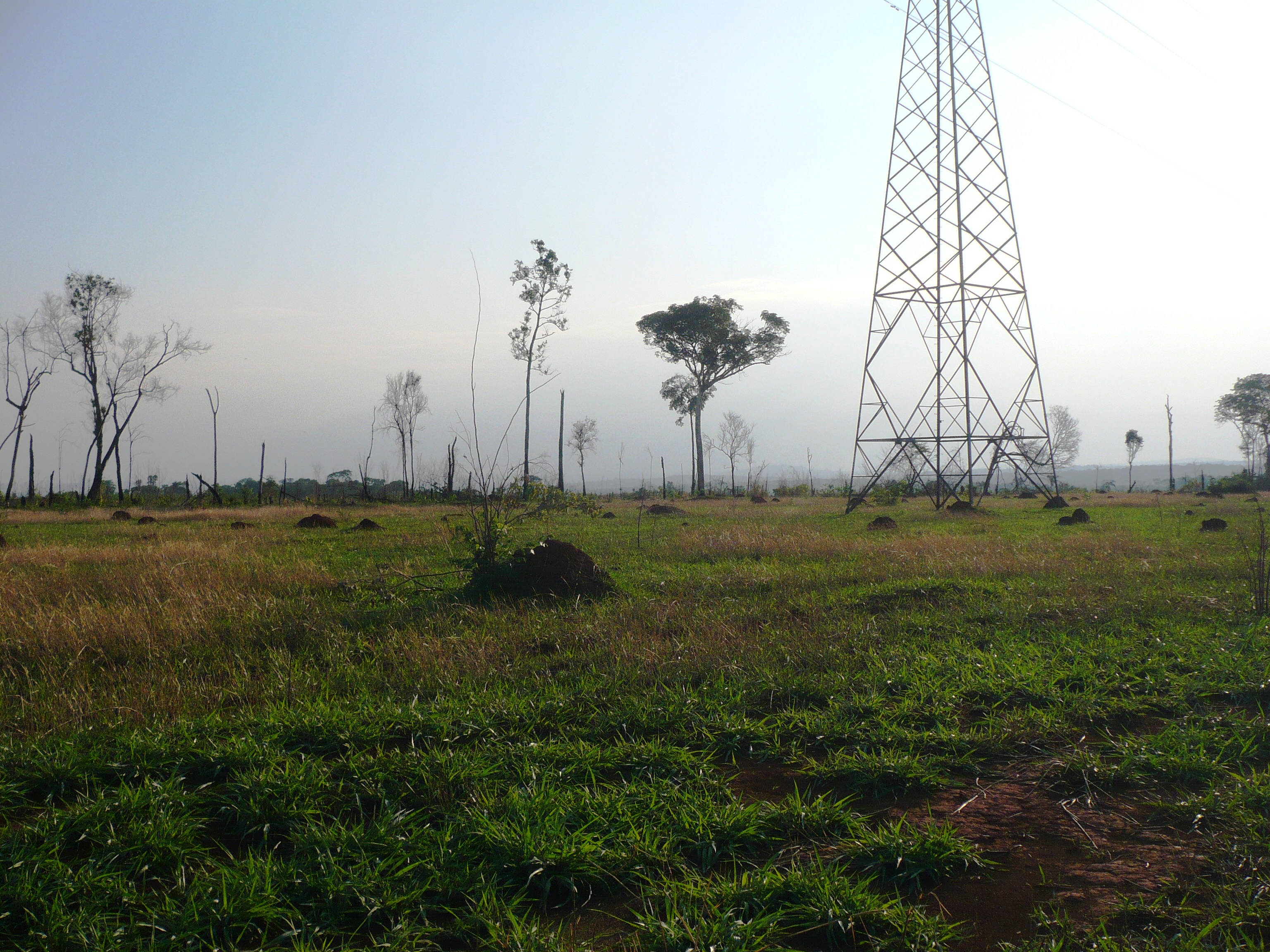 Goiânia, Bairro Vale dos Sonhos próxima à barragem João Leite